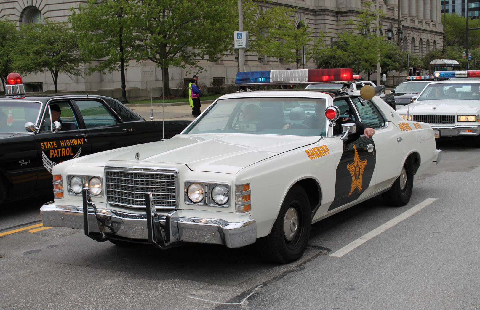 Ein Ford LTD aus den 1970ern als Sheriffwagen (Cleveland, Ohio)